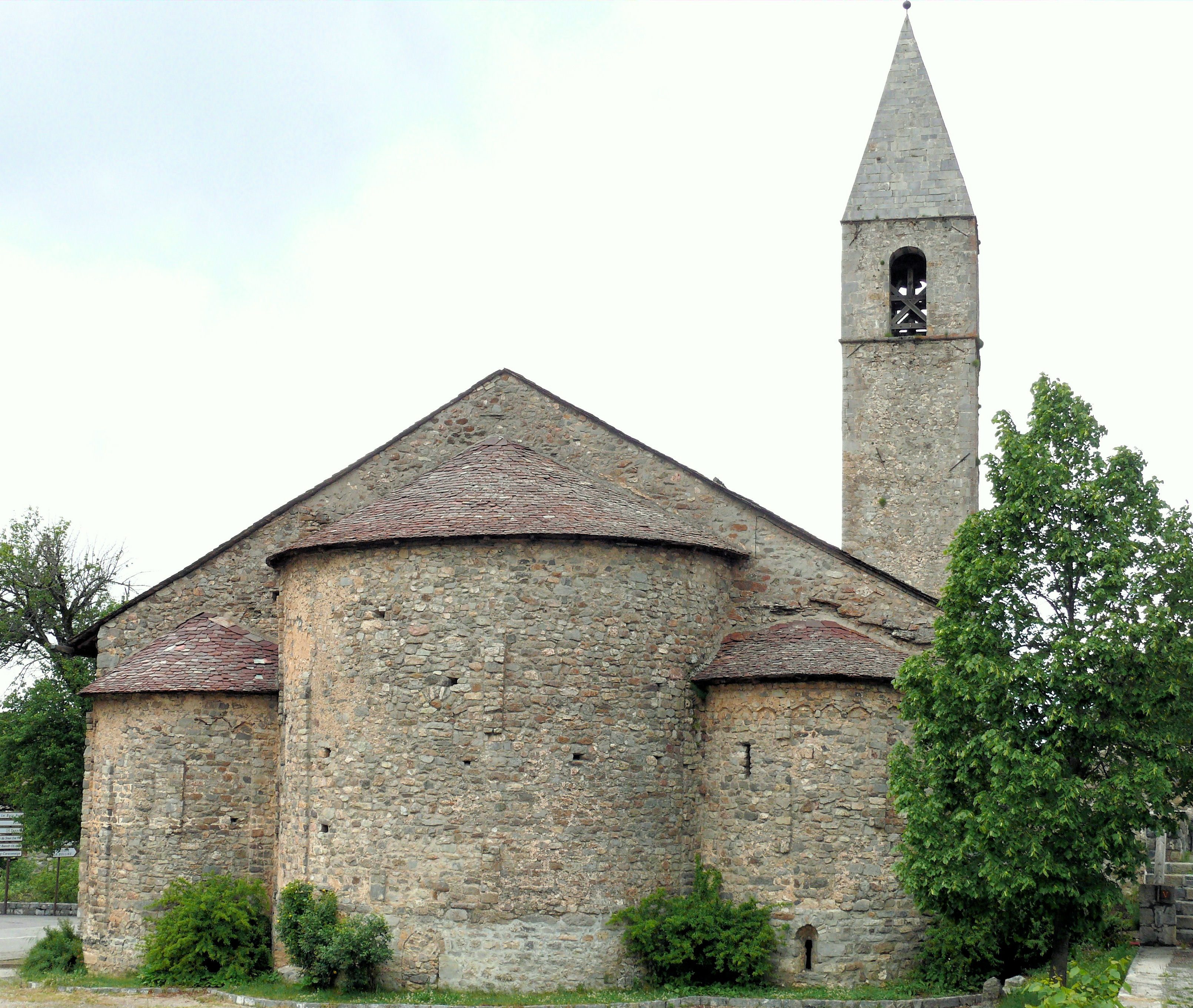 Valdeblore - Saint-Dalmas - Eglise de l'Invention-de-la -Sainte-Croix